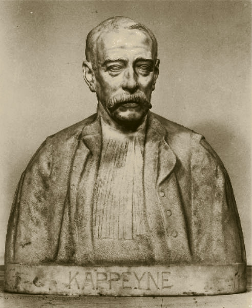 "Kappeyne", marmer, 1921